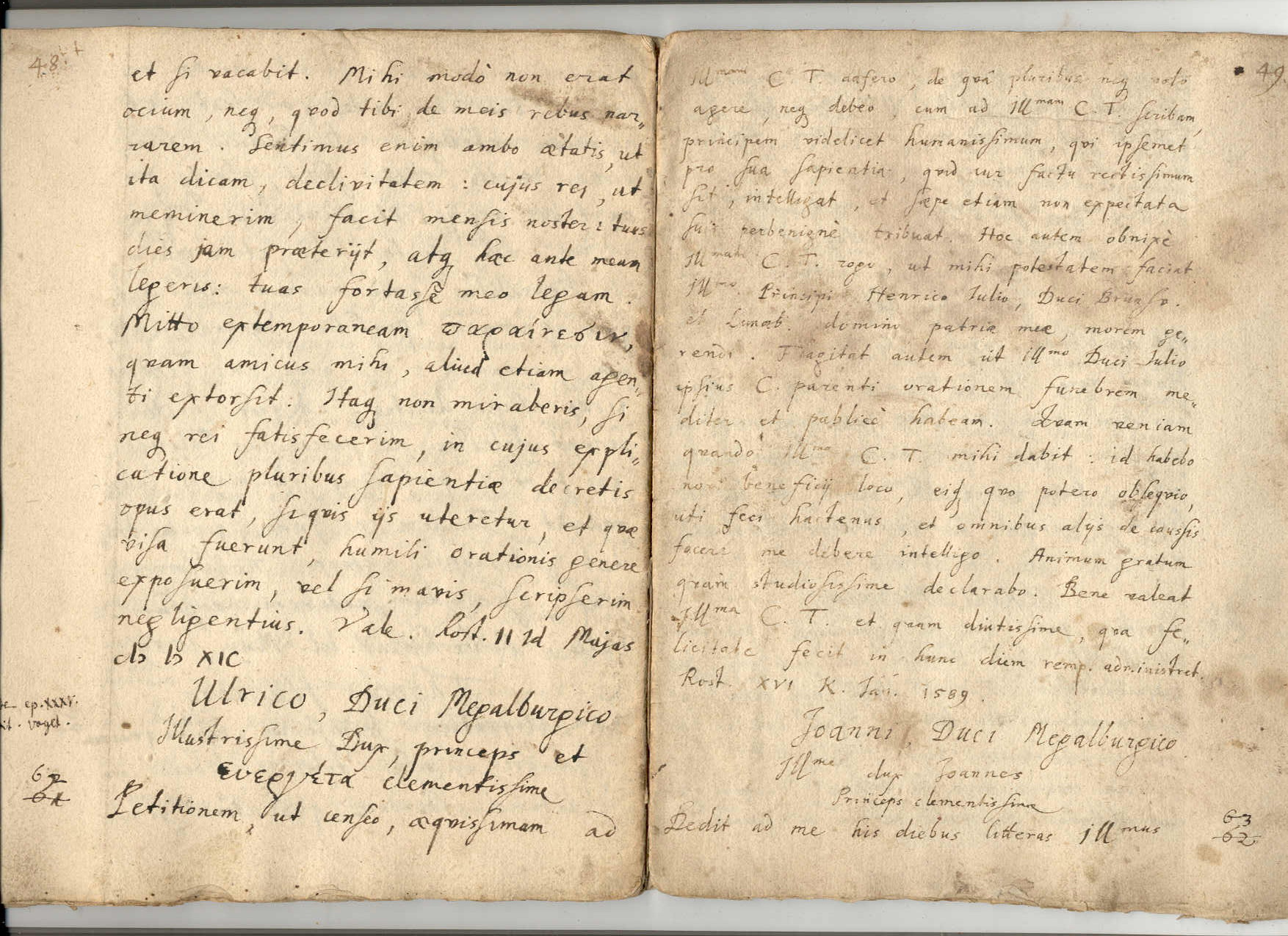 Johannes Caselius (1533-1589): Brief aus Rostock nach Schwerin an Herzog Urich von Mecklenburg, April/Mai 1589